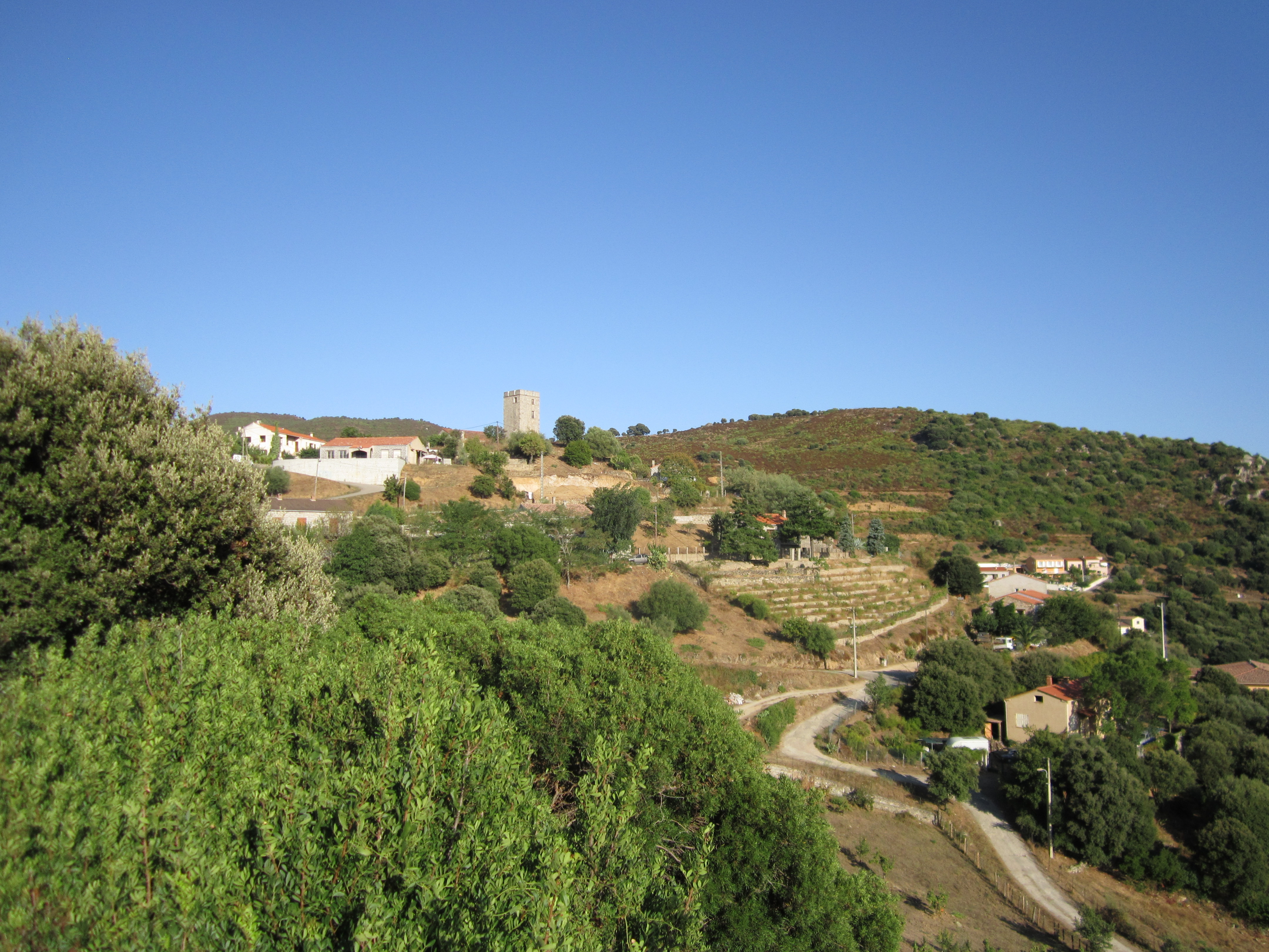 Arbellara, Corse